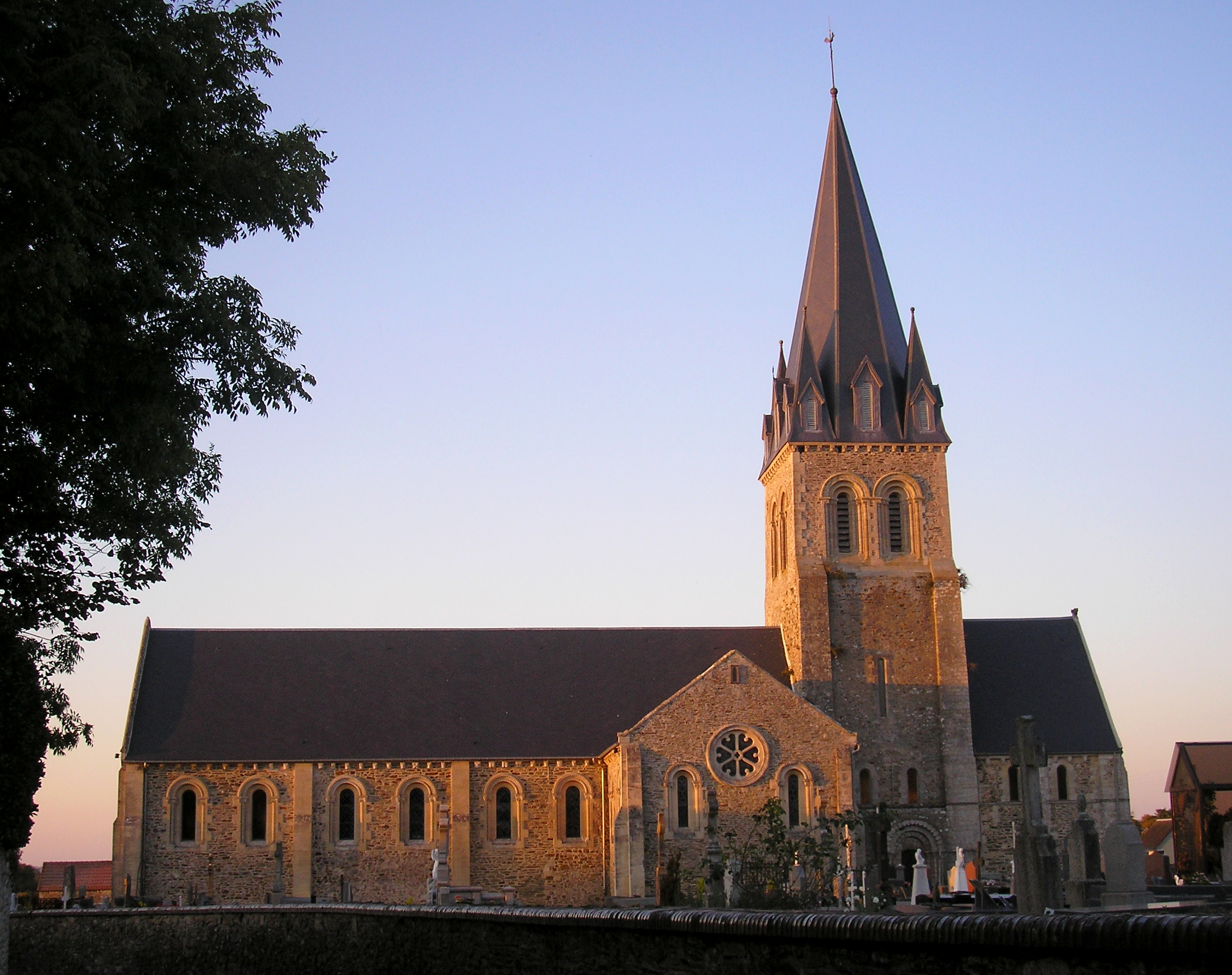 Le Molay-Littry (Normandie, France). L'église Saint-Germain de Littry.